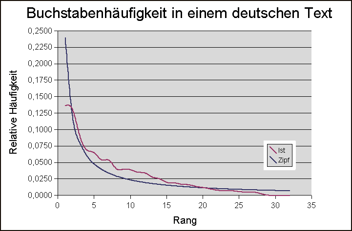 Vergleich der Verteilung von Buchstabenhäufigkeiten eines Textes mit einer Verteilung nach Zipf Häufigkeit der Buchstaben und einiger Satzzeichen in einem deutschen Text Rang Wort rel. Häuf. zipfsche Häufigkeit 1 E 0.13678 0.23955 2 Leerz. 0.13048 0.11977 3 N 0.09034 0.07985 4 I 0.06908 0.05989 5 R 0.06501 0.04791 6 S 0.05426 0.03992 7 T 0.05386 0.03422 8 D 0.04119 0.02994 9 A 0.04011 0.02662 10 U 0.03947 0.02395 11 H 0.03565 0.02178 12 L 0.03449 0.01996 13 G 0.02820 0.01843 14 C 0.02565 0.01711 15 O 0.02016 0.01597 16 M 0.01938 0.01497 17 B 0.01743 0.01409 18 F 0.01663 0.01331 19 W 0.01409 0.01261 20 K 0.01230 0.01198 21 Z 0.01032 0.01141 22 . 0.00818 0.01089 23 , 0.00790 0.01042 24 V 0.00755 0.00998 25 Ü 0.00613 0.00958 26 P 0.00560 0.00921 27 Ä 0.00537 0.00887 28 Ö 0.00289 0.00856 29 J 0.00064 0.00826 30 Q 0.00033 0.00798 31 Y 0.00027 0.00773 32 X 0.00014 0.00749